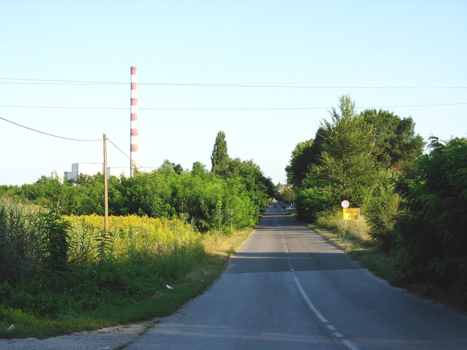 Ulaz u naselje Šangaj, Novi Sad.